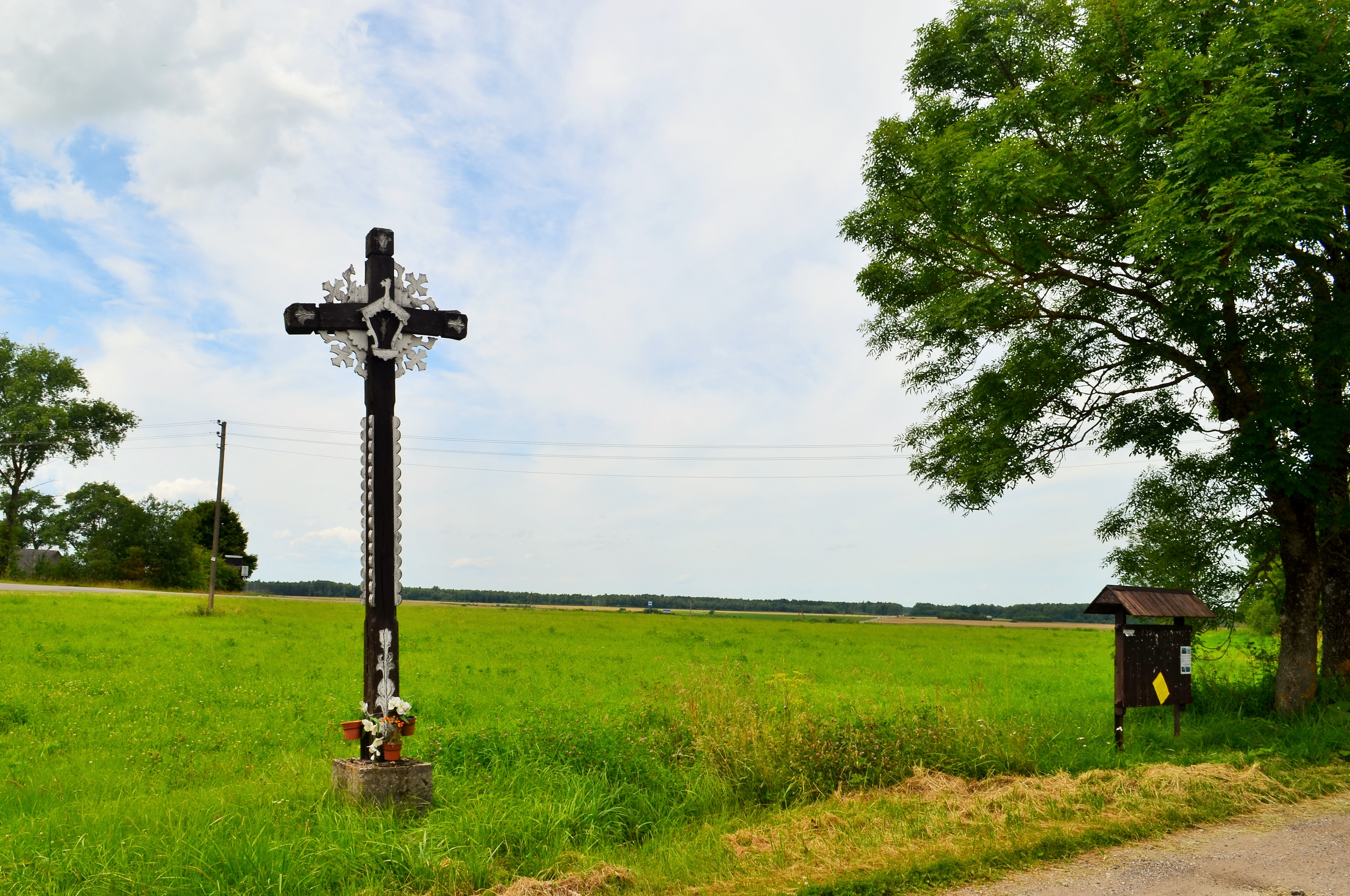 Kryžius Tatkūnuose, Ukmergės raj.